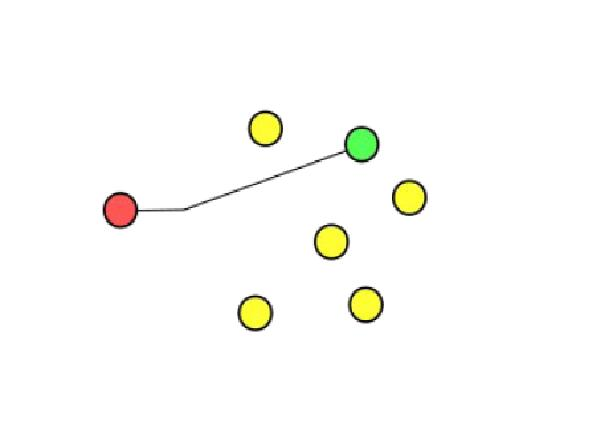 un sencillo diagrama